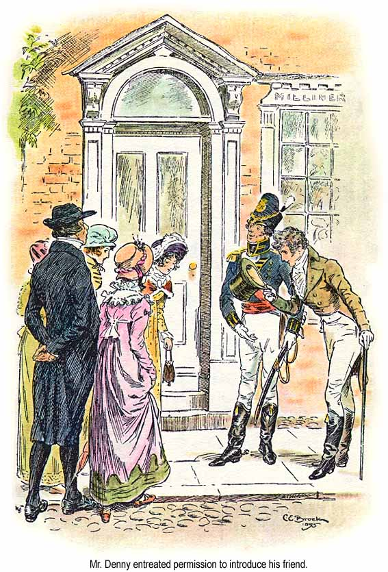 C. E. Brock illustration for the 1895 edition of Jane Austen's novel Pride and Prejudice (Chapter 15) C. E. Brock illustration pour l'édition 1895 du roman de Jane Austen Orgueil et Préjugés (Chapitre 15) A Meryton, Denny présente Wickham aux demoiselles Bennet.